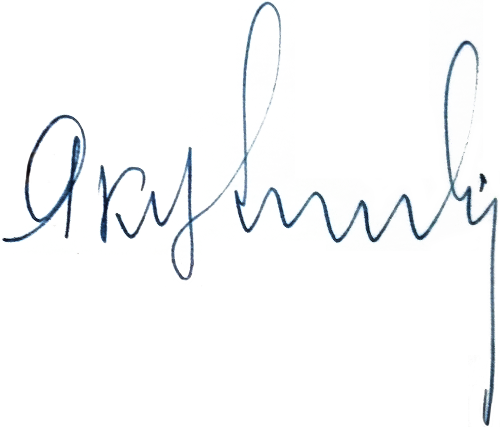 Роспись командующего войсками Киевского военного округа генерала армии Ивана Якубовского (1912–1976)